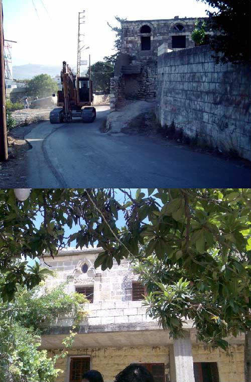 بيوت على الطراز - بلدة عبا جنوب لبنان